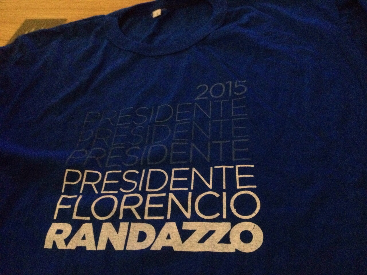 Remera de campaña de Florencio Randazzo (Frente para la Victoria), mayo de 2015.